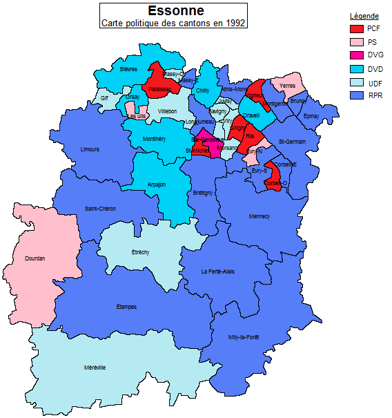 Carte politique des cantons de l'Essonne en 1992